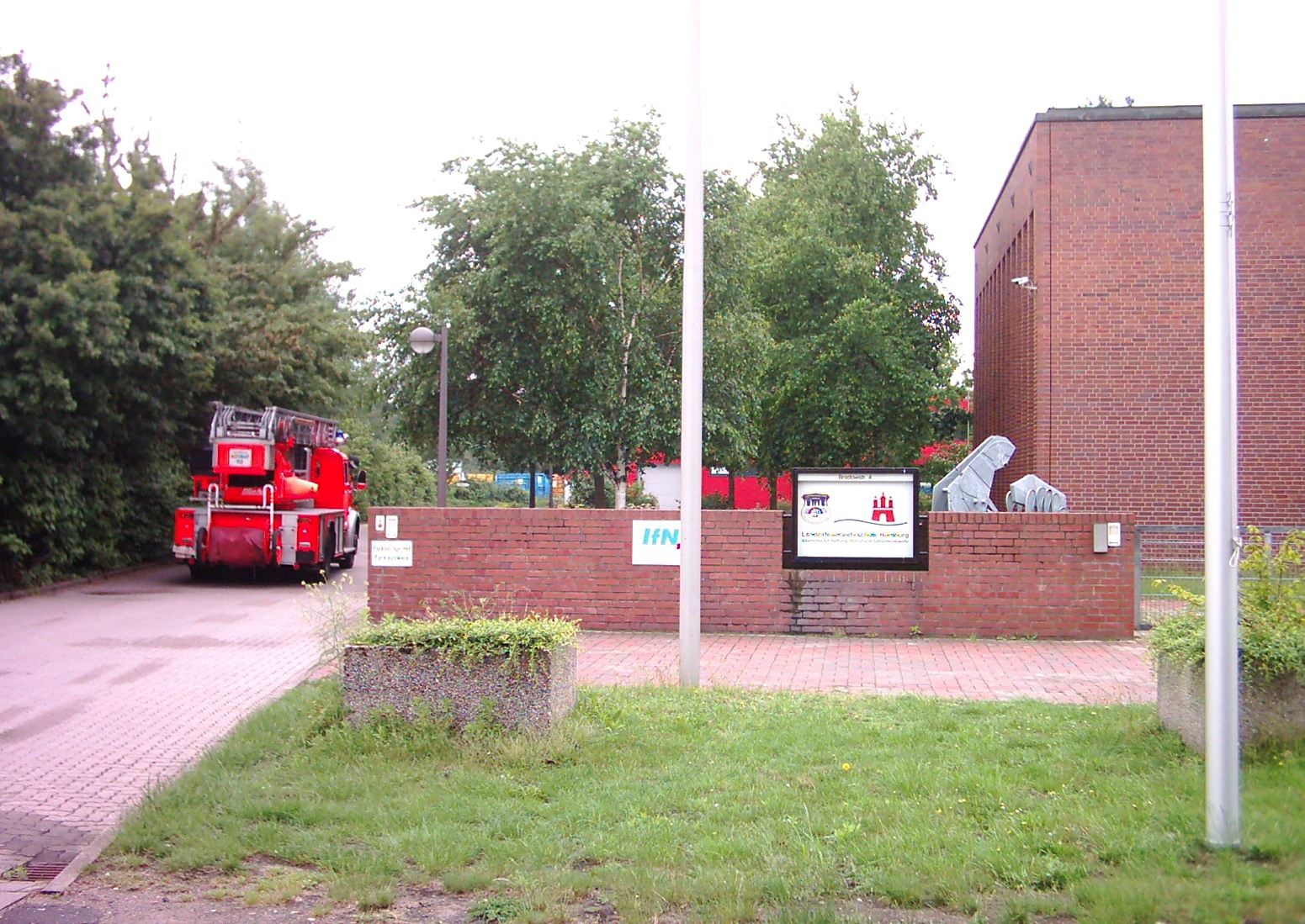 Die Landesfeuerwehrschule Hamburg in der Bredowstraße mit einfahrendem Drehleiterwagen.